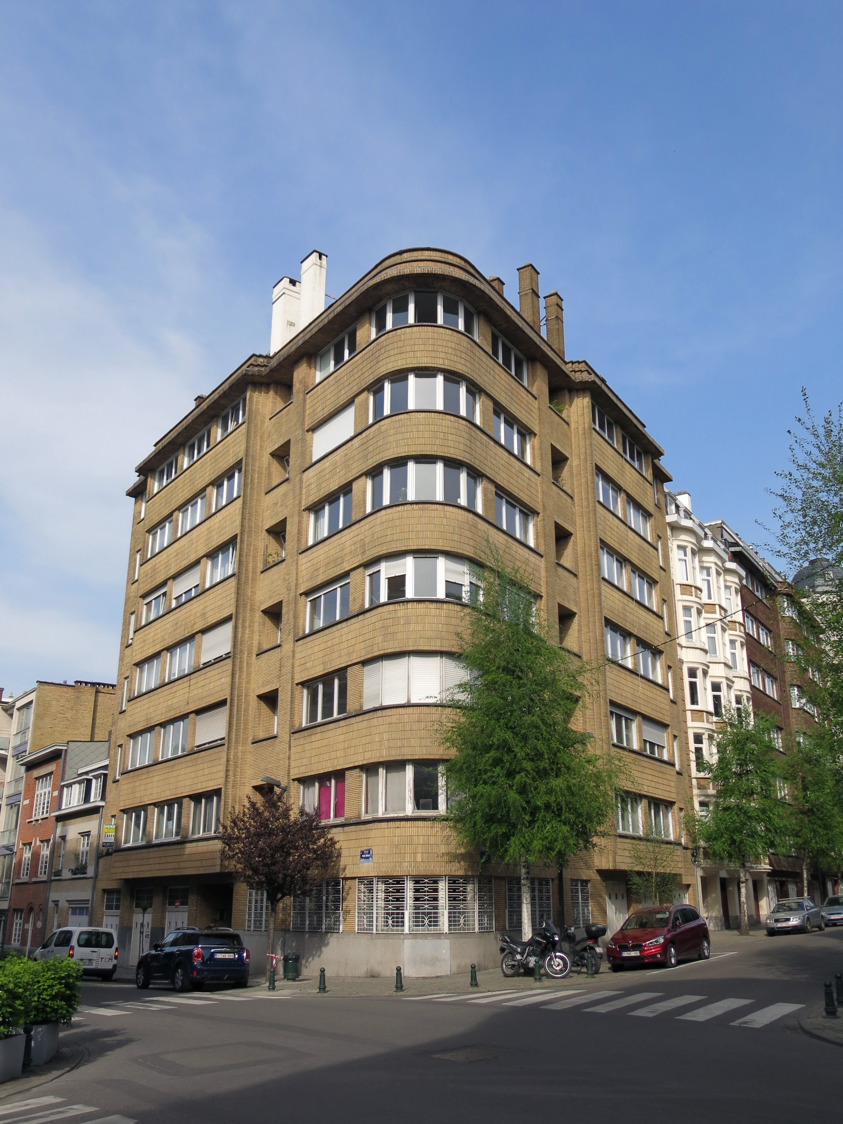 Photo d'angle des façades à rue